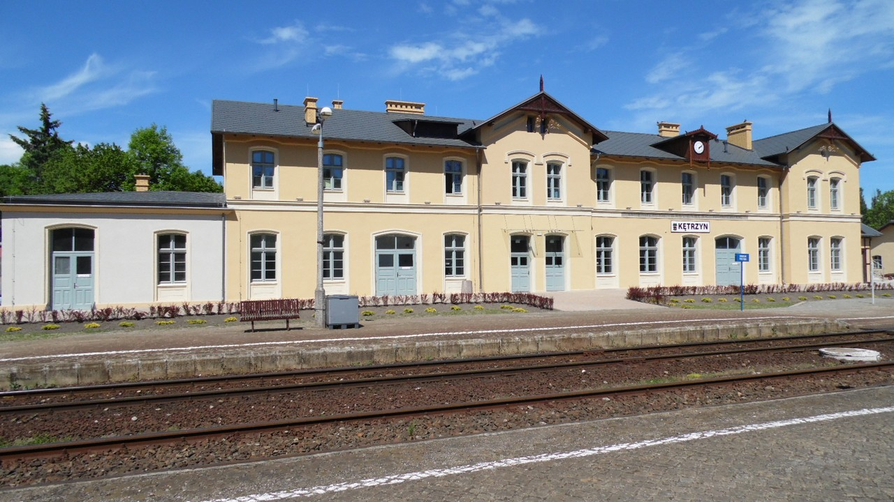 PKP. DWORZEC KOLEJOWY OD STRONY TORÓW.